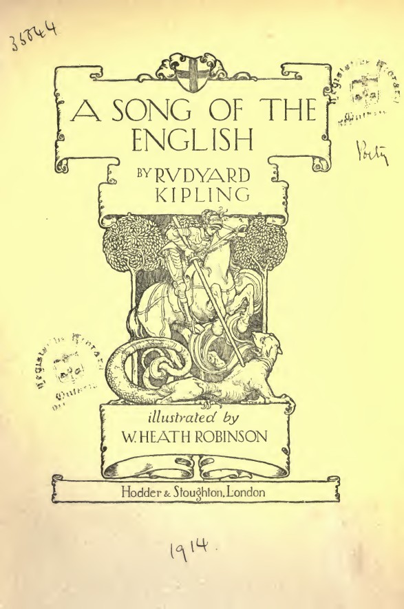 A Song of the English / by Rudyard Kipling ; illustrated by W. Heath Robinson. - London : Hodder & Stoughton, [1914?]. - 1 volume (senza paginazione) : ill. ; 21 cm . Frontespizio